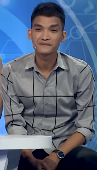 Bộ 3 Siêu Đẳng Vòng 1 Tập 6: Cao Thái Hà la hét trong lồng banh, Pha Lê thể hiện trí nhớ cực đỉnh Mạc Văn Khoa, ảnh chụp màn hình từ video của BEE Entertainment / Giải Trí (screen capture from video of BEE Entertainment / Giải Trí)